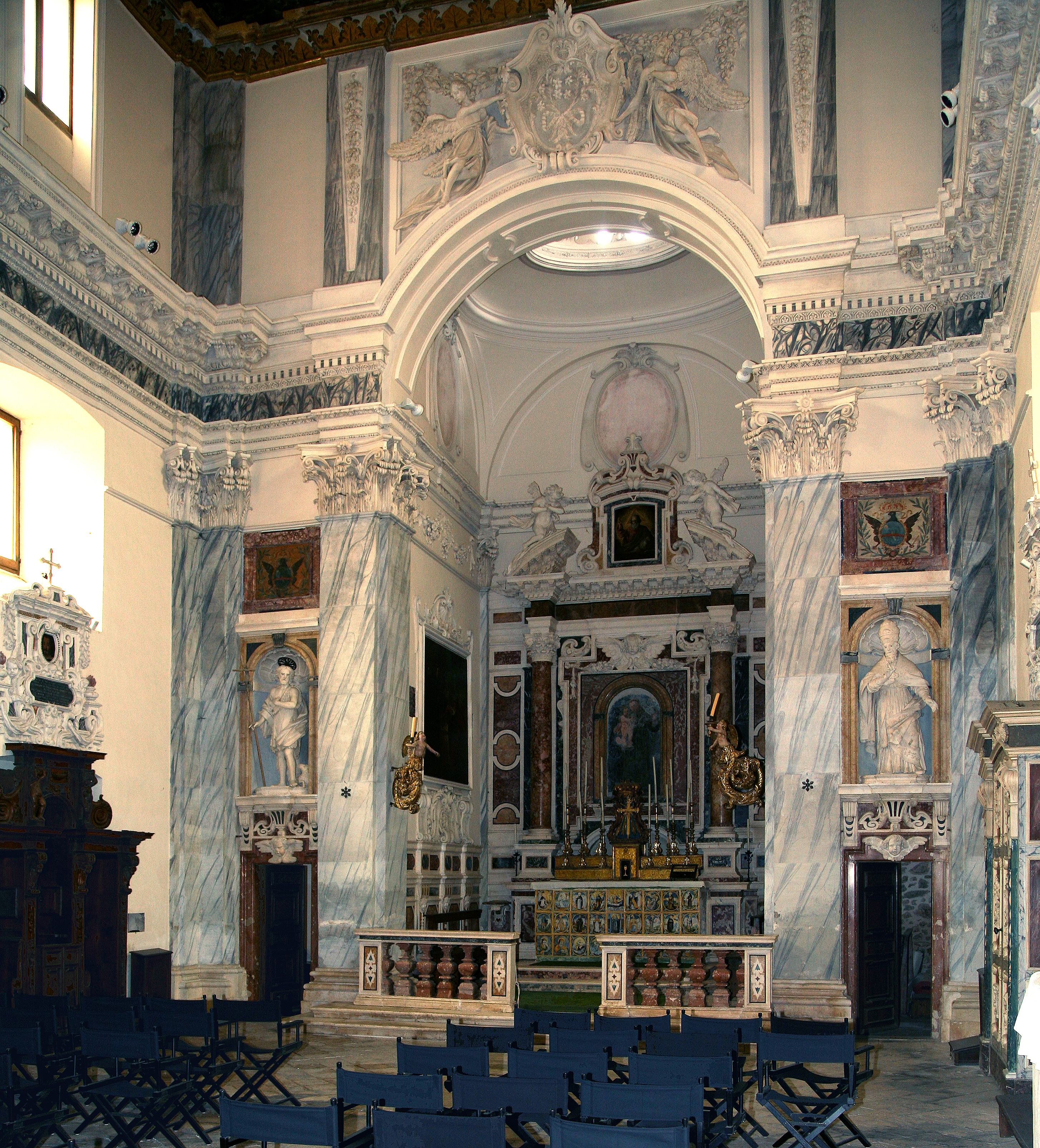 Parete absidale dell'Oratorio di Sant'Antonio dei Cavalieri de Nardis, L'Aquila